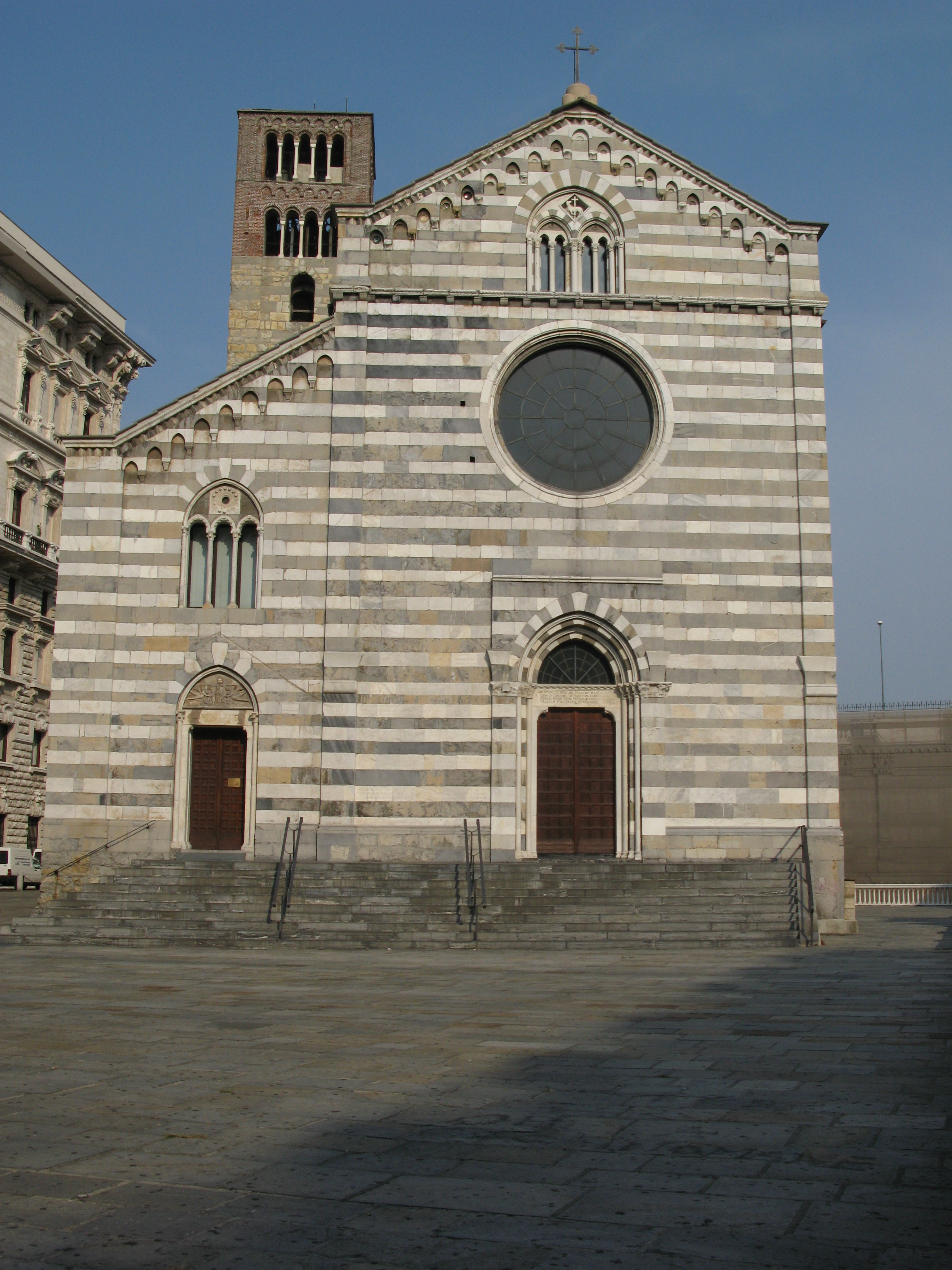 Chiesa di Santo Stefano, Genova, Liguria, Italia